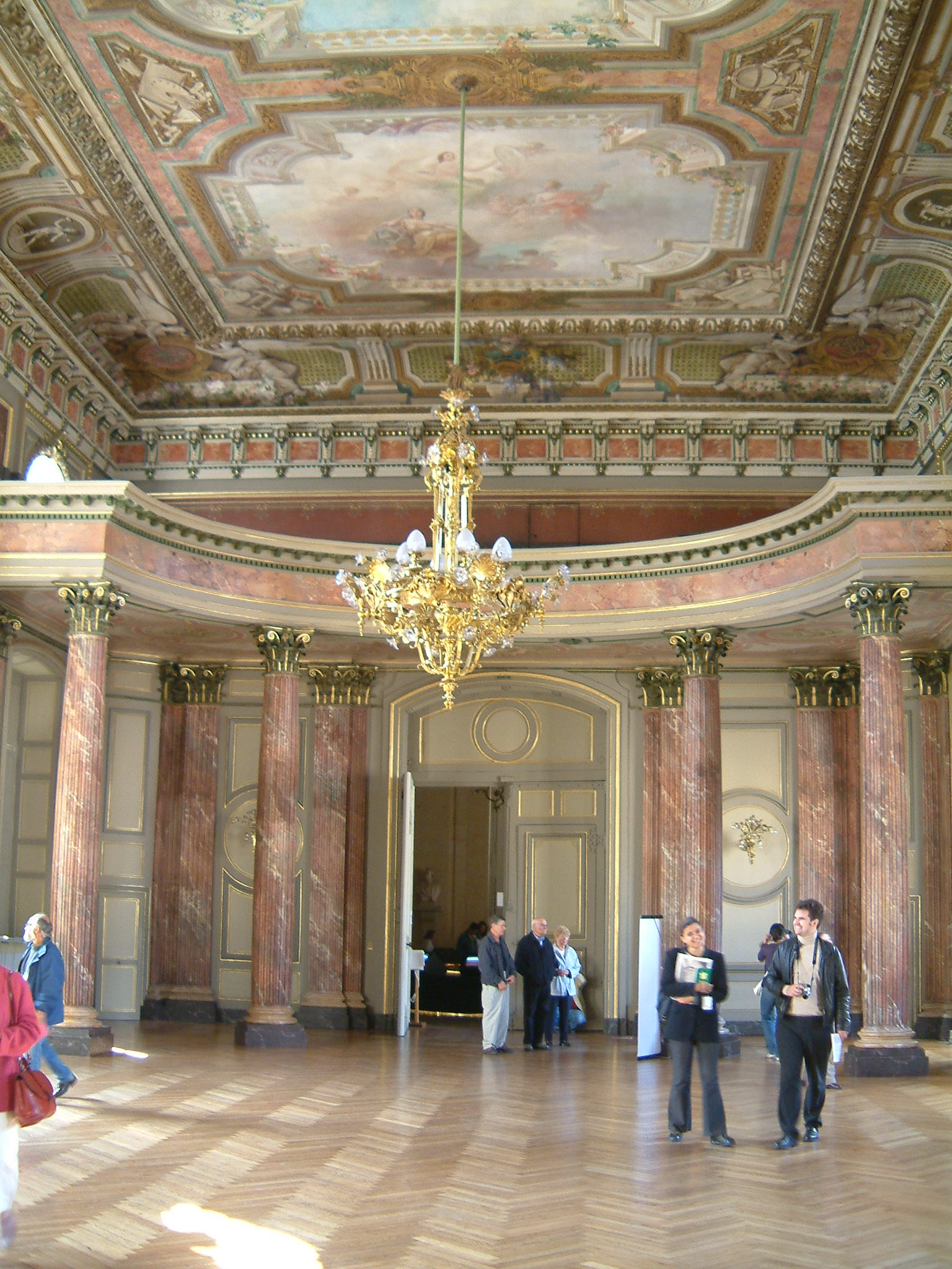 Palais des Ducs de Bourgogne, Dijon, Bourgogne, FRANCE.